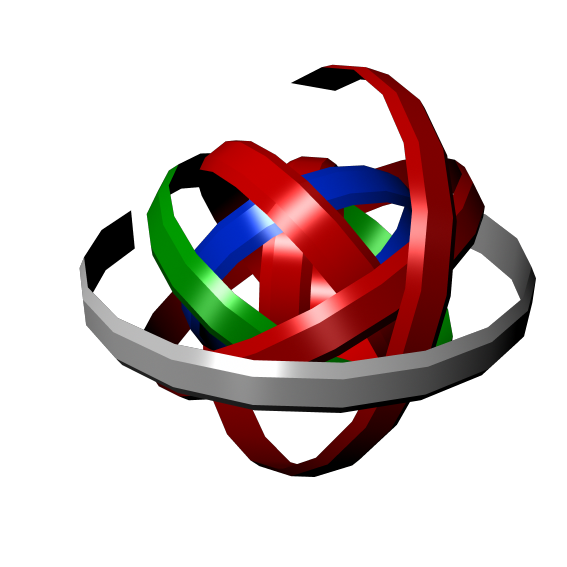 logo oficial de la Expoteleinfo